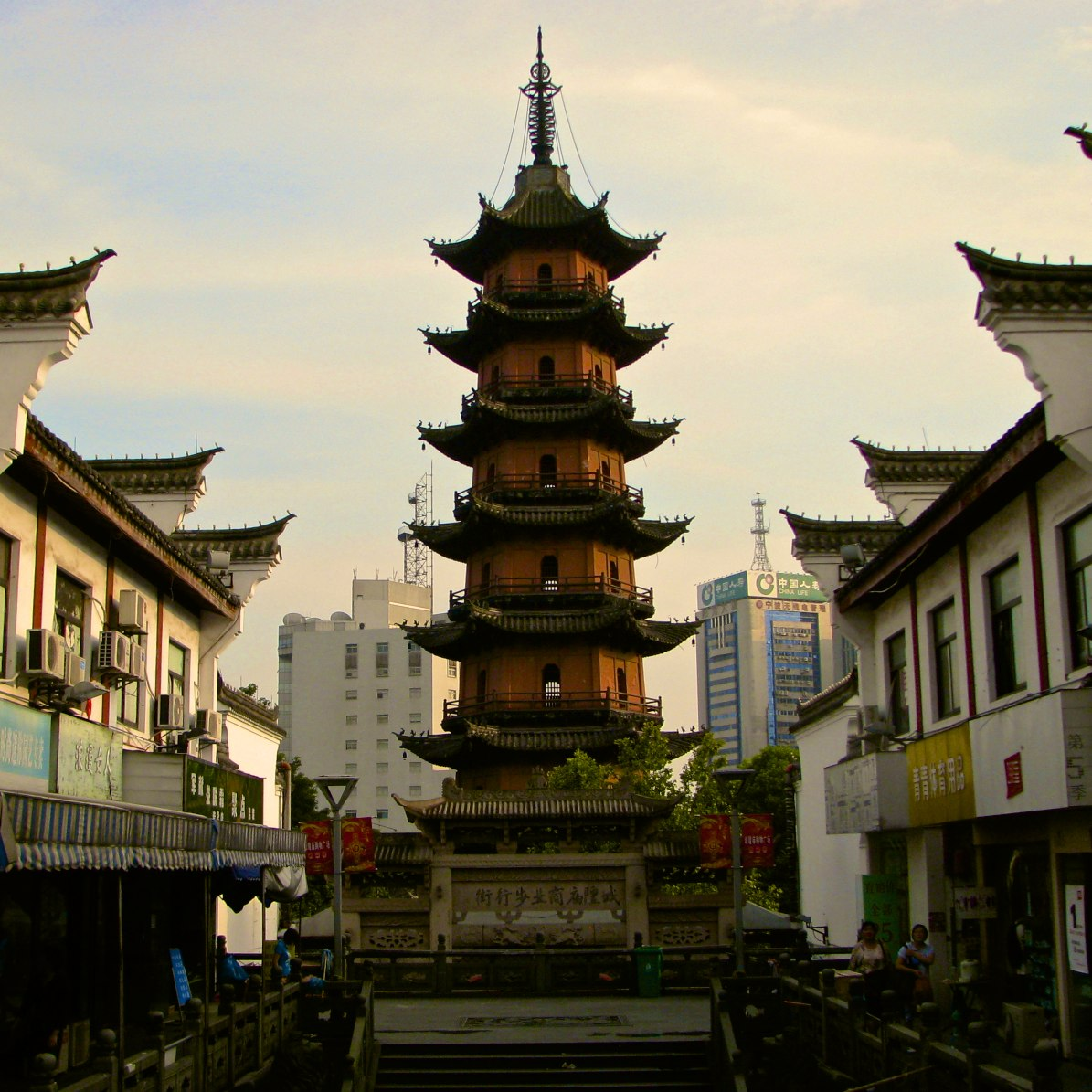 天封塔